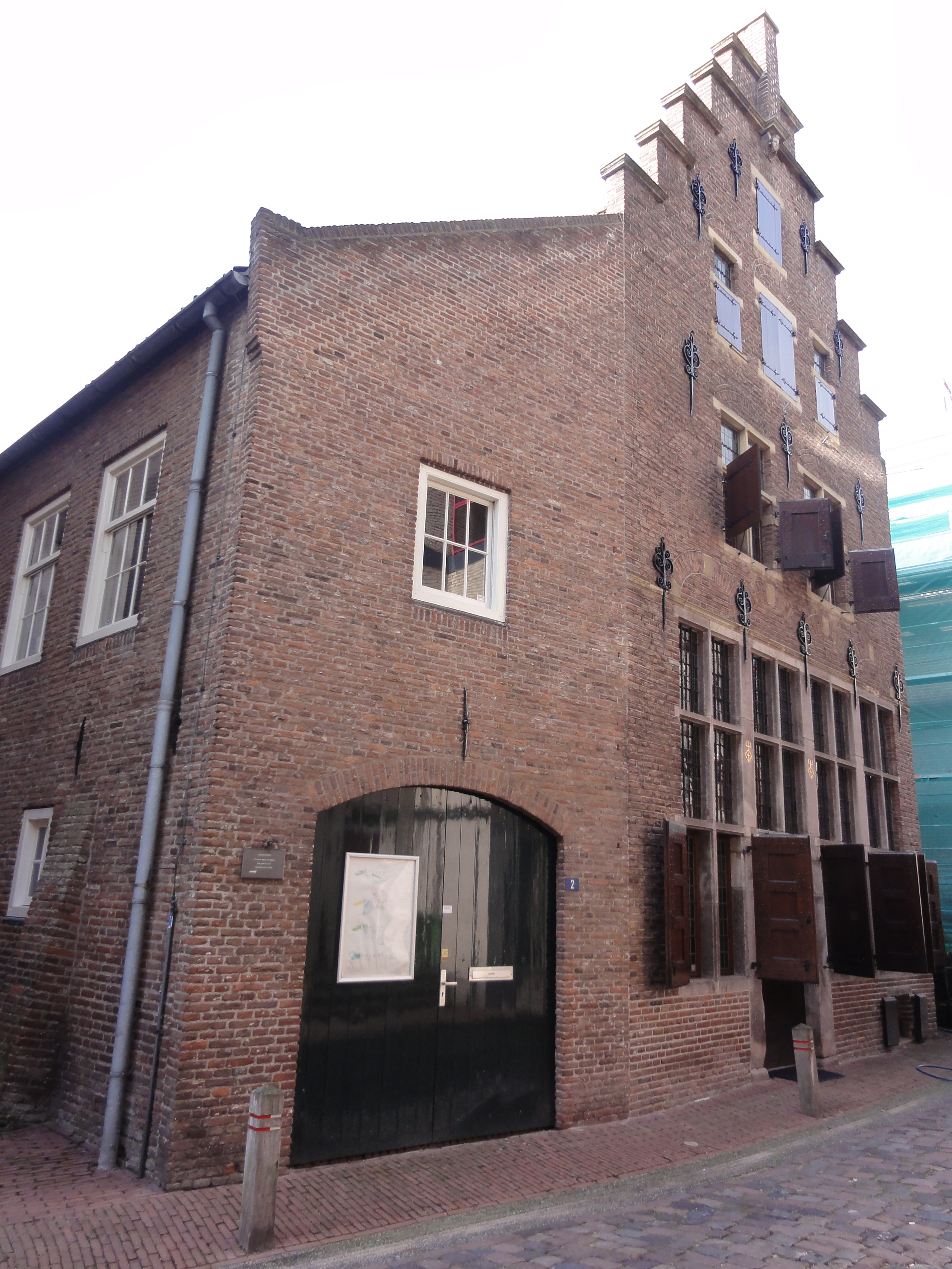 Nijmegen Rijksmonument 31184 zijde Steenstraat 2 81″ N, 5° 51′ 56.77″ E Object location51° 50′ 57.03″ N, 5° 51′ 58.15″ E